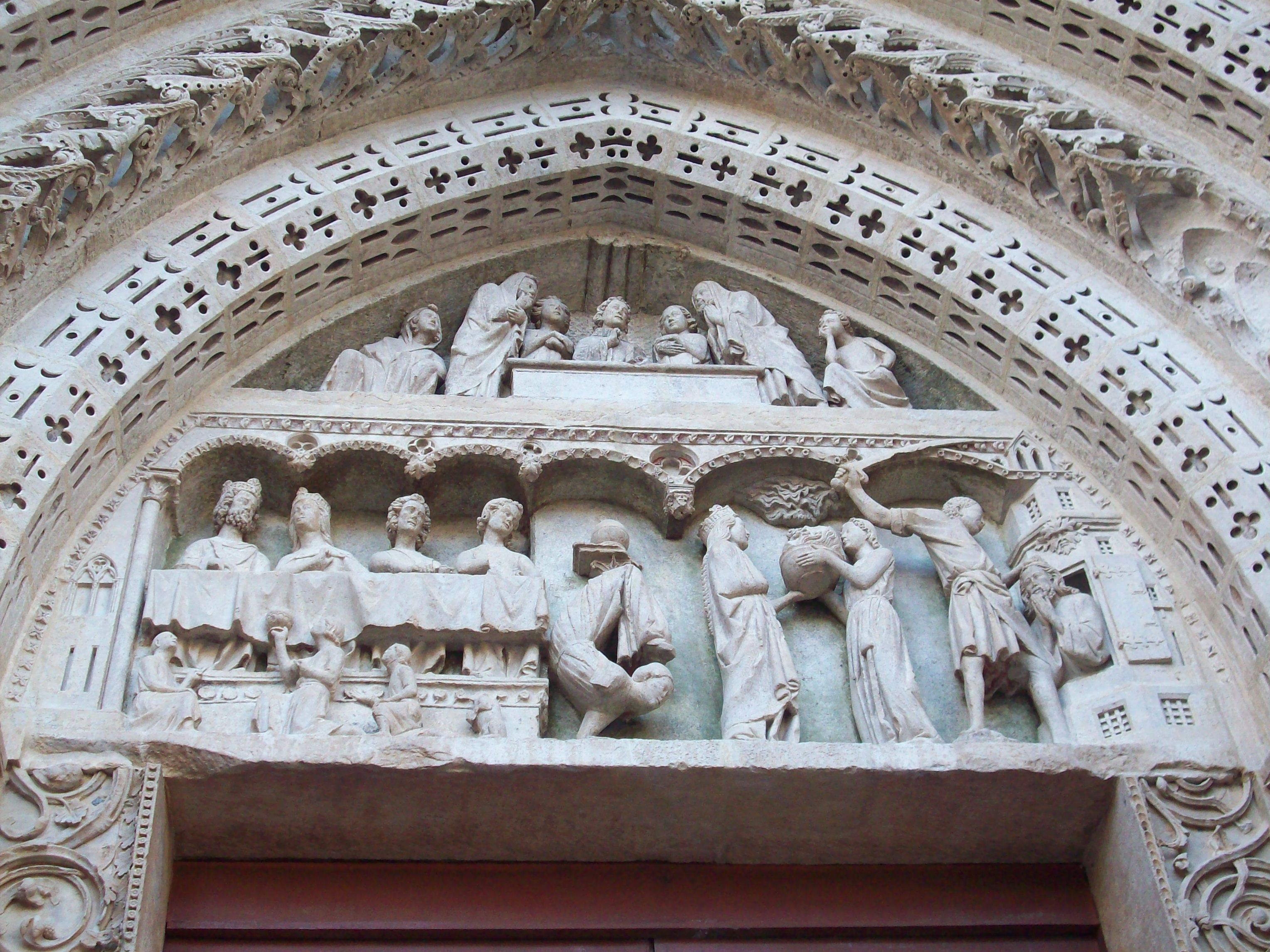 Tympan du portail Saint-Jean.